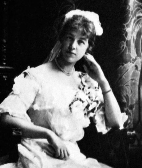 कैरोलिन एलिस एलगर